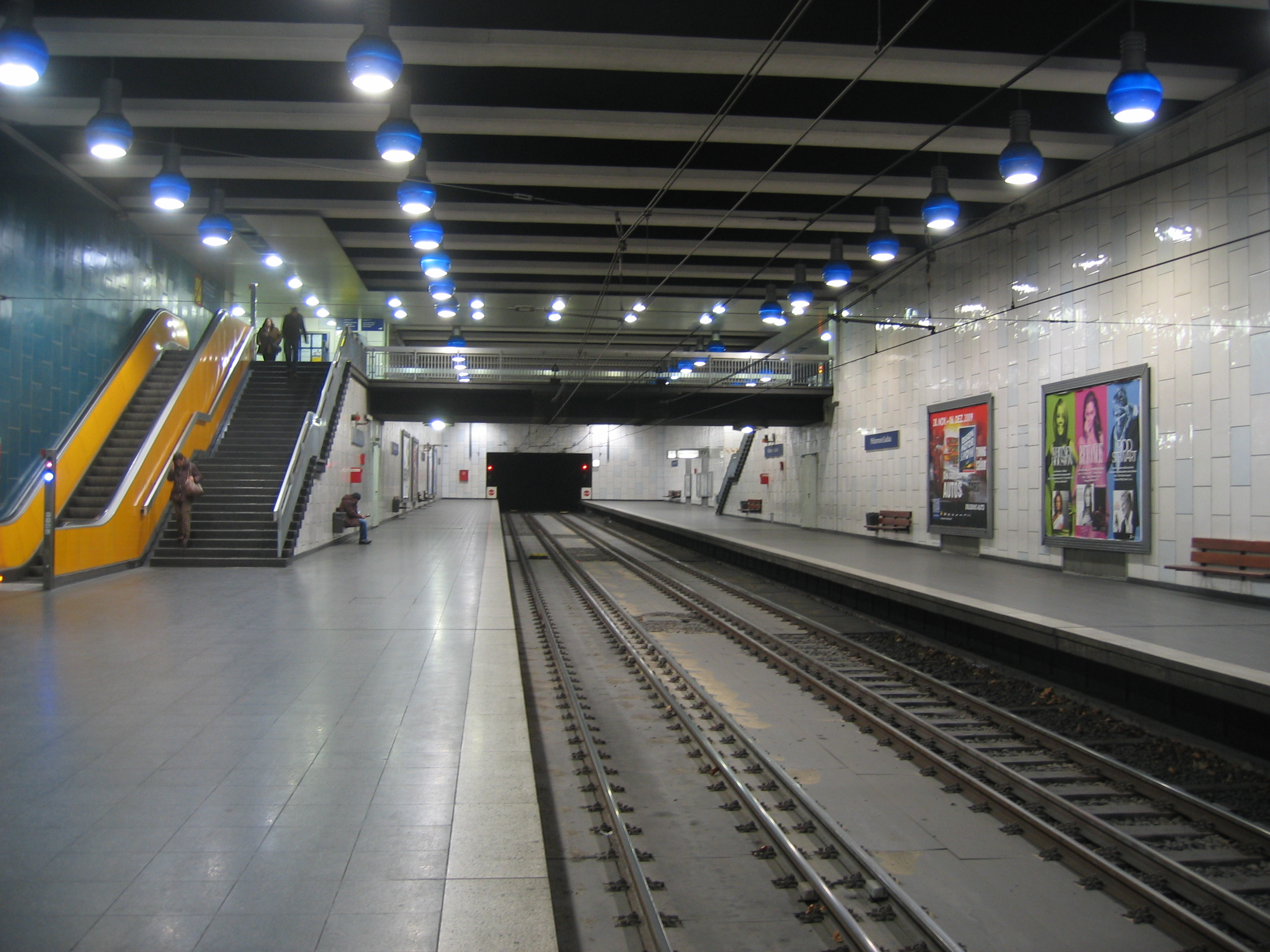 U-Bahnhof Philharmonie/Saalbau der Stadtbahn Essen